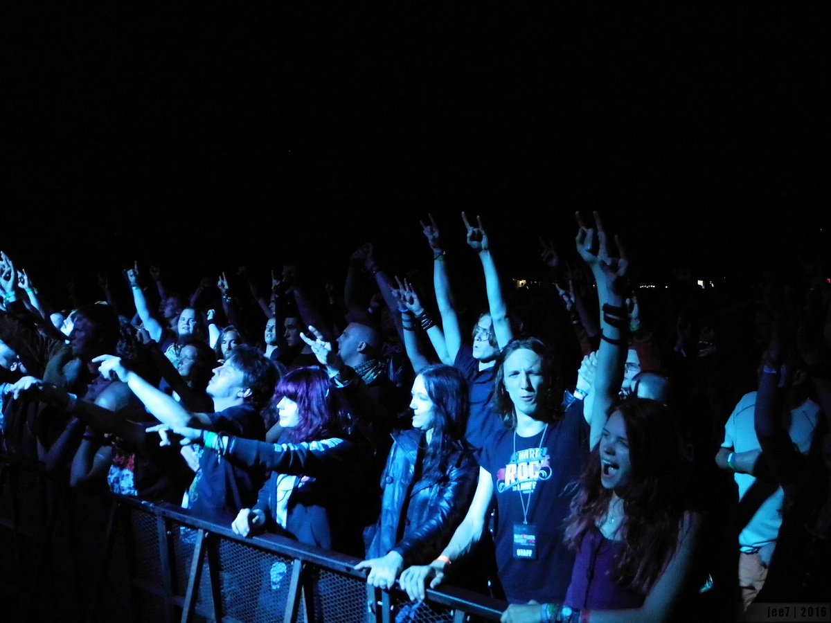 At the Gates publik muusikafestivalil Hard Rock Laager 2016.